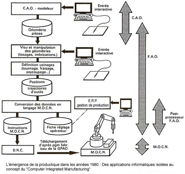 L'émergence de la productique dans les années 1980 : Des applications informatiques isolées au concept du "Computer Integrated Manufacturing" source : CIM, les nouvelles perspectives de la production, Jean-Baptiste Waldner, DUNOD, 1990, reproduit avec l'autorisation de l'auteur.